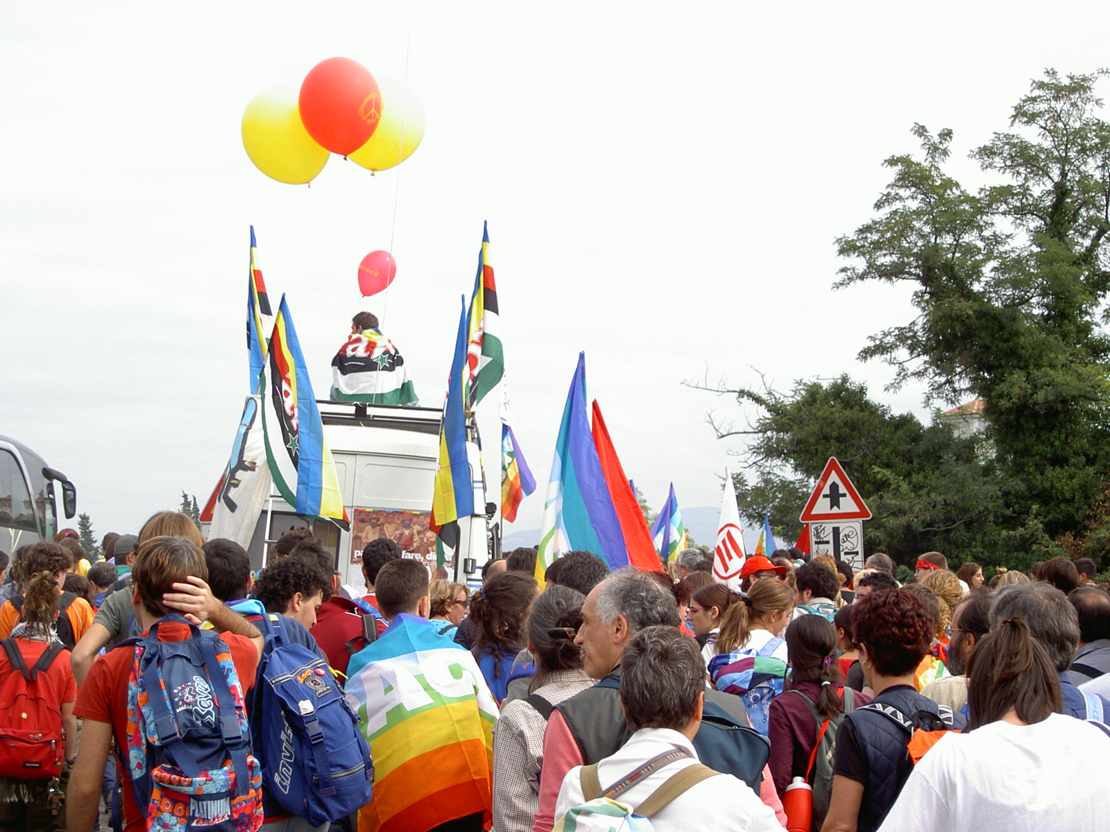 Italia, Marcia per la Pace Perugia - Assisi, ottobre 2003.